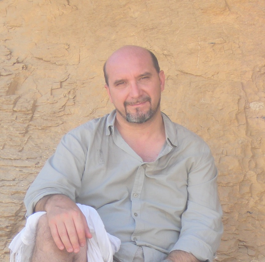 opera propria, giacomo cavillier